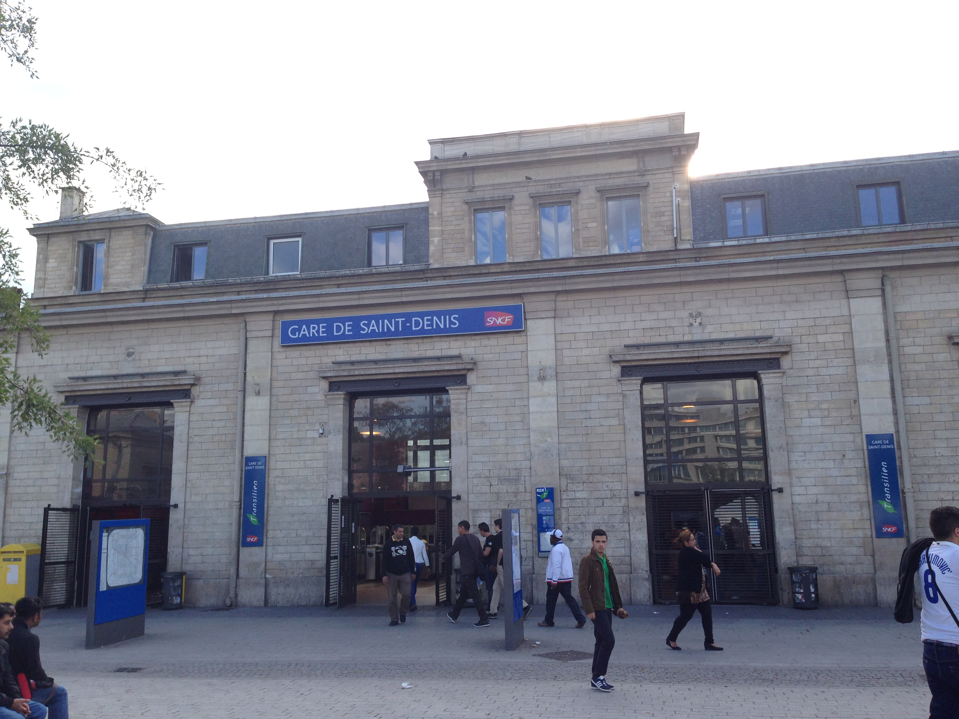 Gare de Saint-Denis-2014